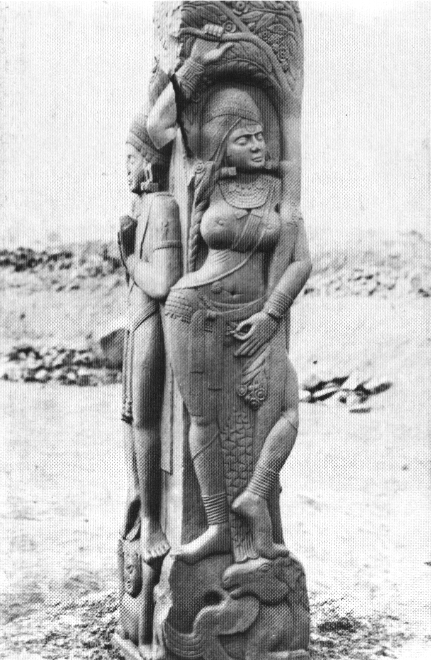 Yaksa in Bharhut